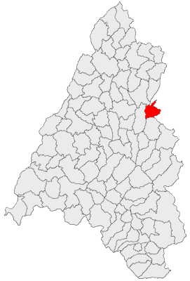 Categorie:Hărţi ale judeţului Bihor